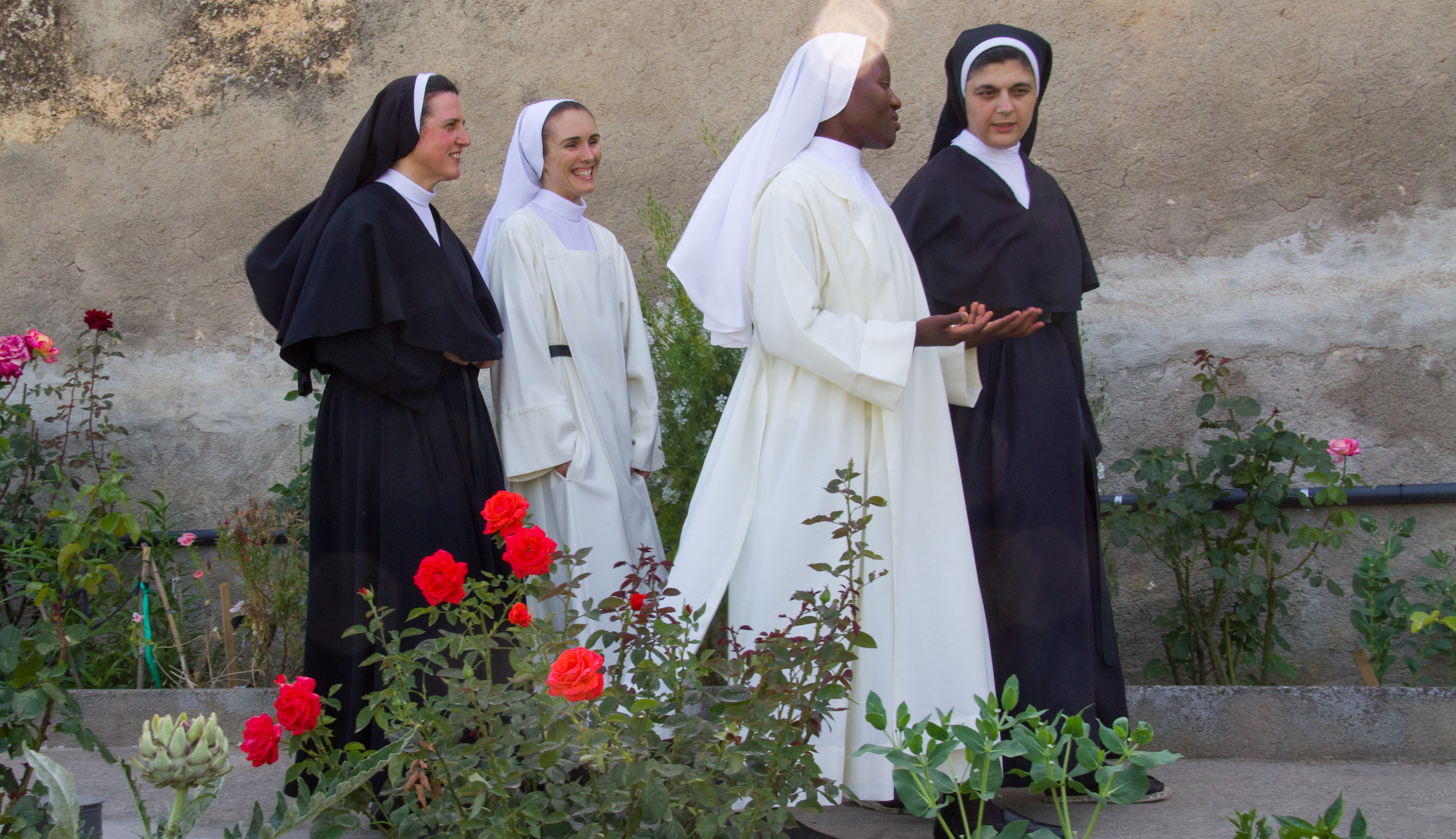 Monjas Agustinas Contemplativas del Convento de Santa Ana en Sant Mateu, Castellón